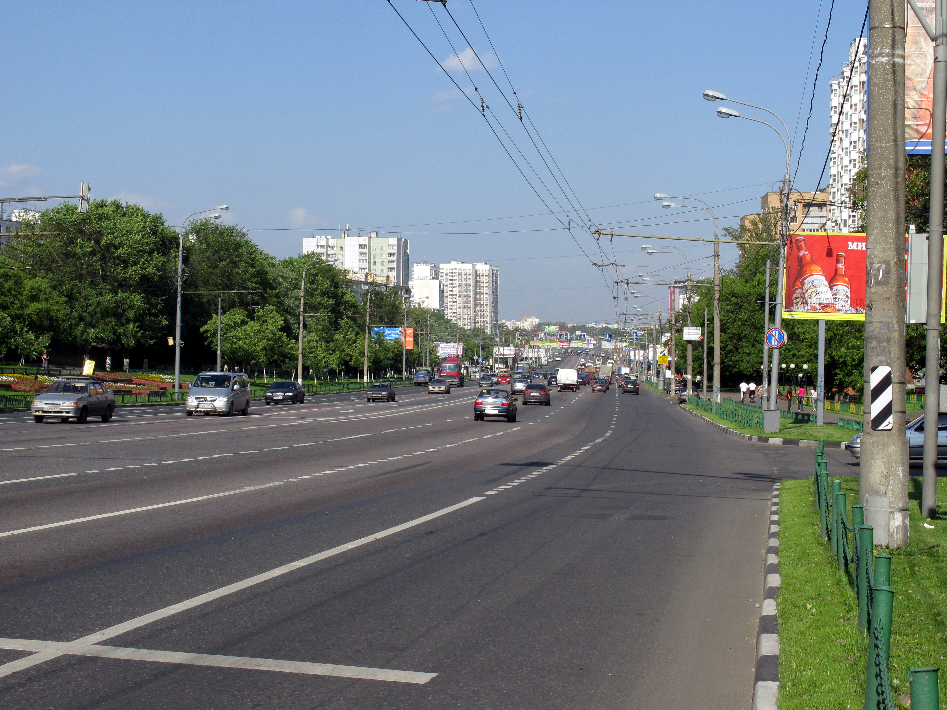 Москва, Щёлковское шоссе в районе дома 78